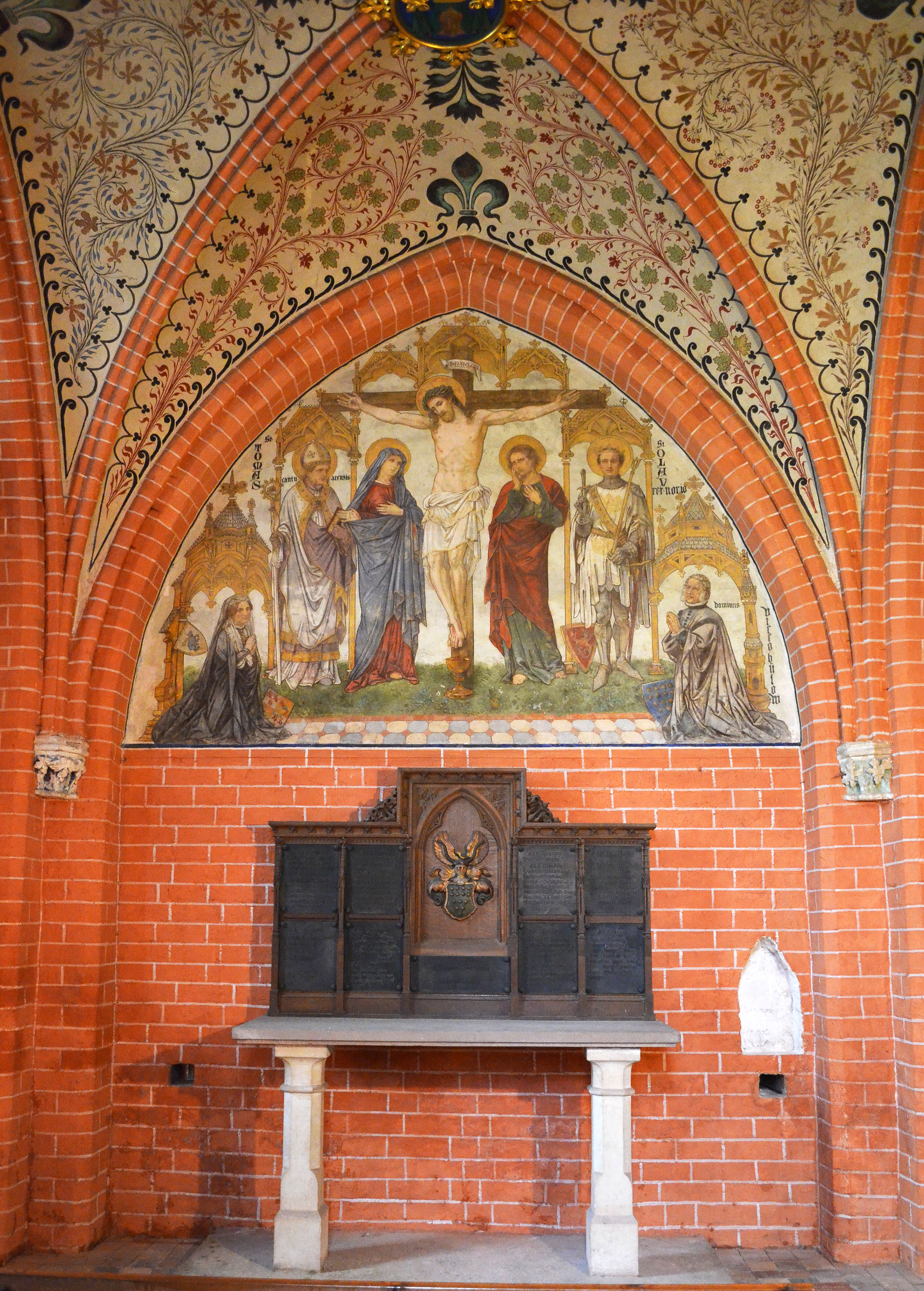 Bad Doberan, Münster, Bülow Kapelle mit historischer Ausmalung von Carl Andreae,1873 1,1